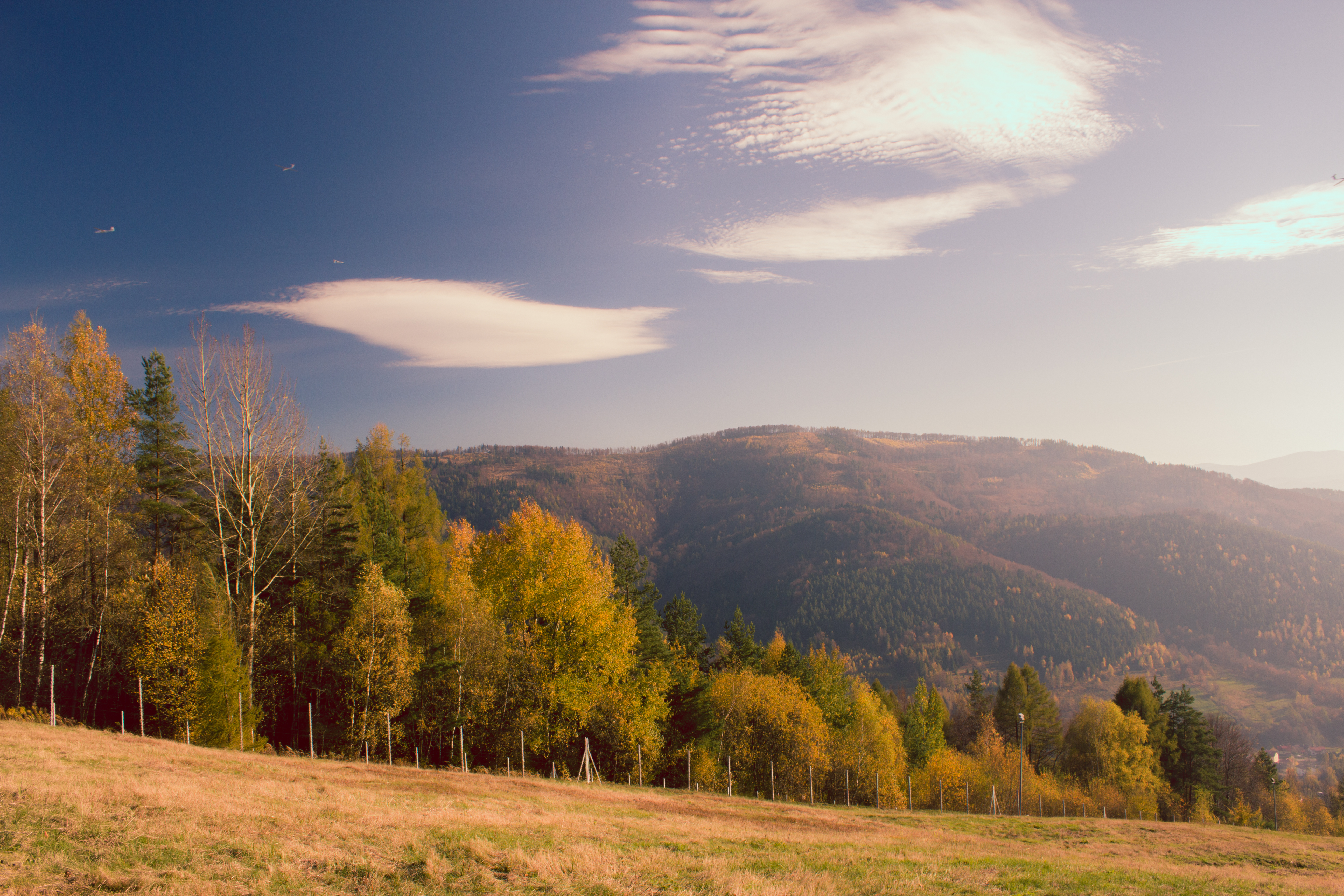 Park krajobrazowy Park Krajobrazowy Beskidu Małego.